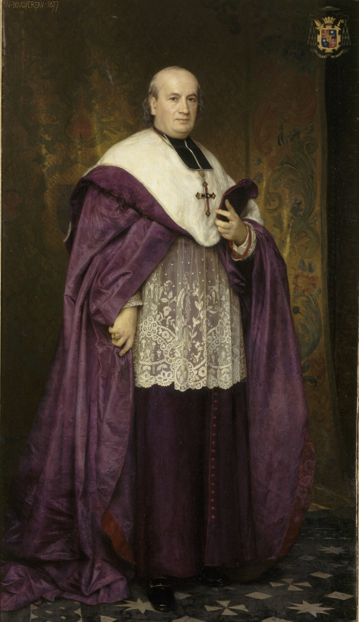 Monseigneur Léon-Benoit-Charles Thomas (1826-1894), évêque de La Rochelle (1867-1883) puis archevêque de Rouen (1883-1894) et cardinal. Huile sur toile: 2.210 x 1.240 m.